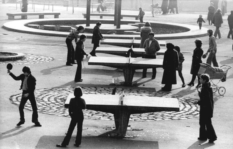 ADN-ZB Kaufhold 24.2.80 Berlin: Vorfrühlingshaftes Wetter lockte viele Hauptstädter zu Spaziergängen und zu sportlichen Aktivitäten, hier im Friedrichshain herrschte schon ein beträchtlicher Andrang an den Tischtennisplatten.